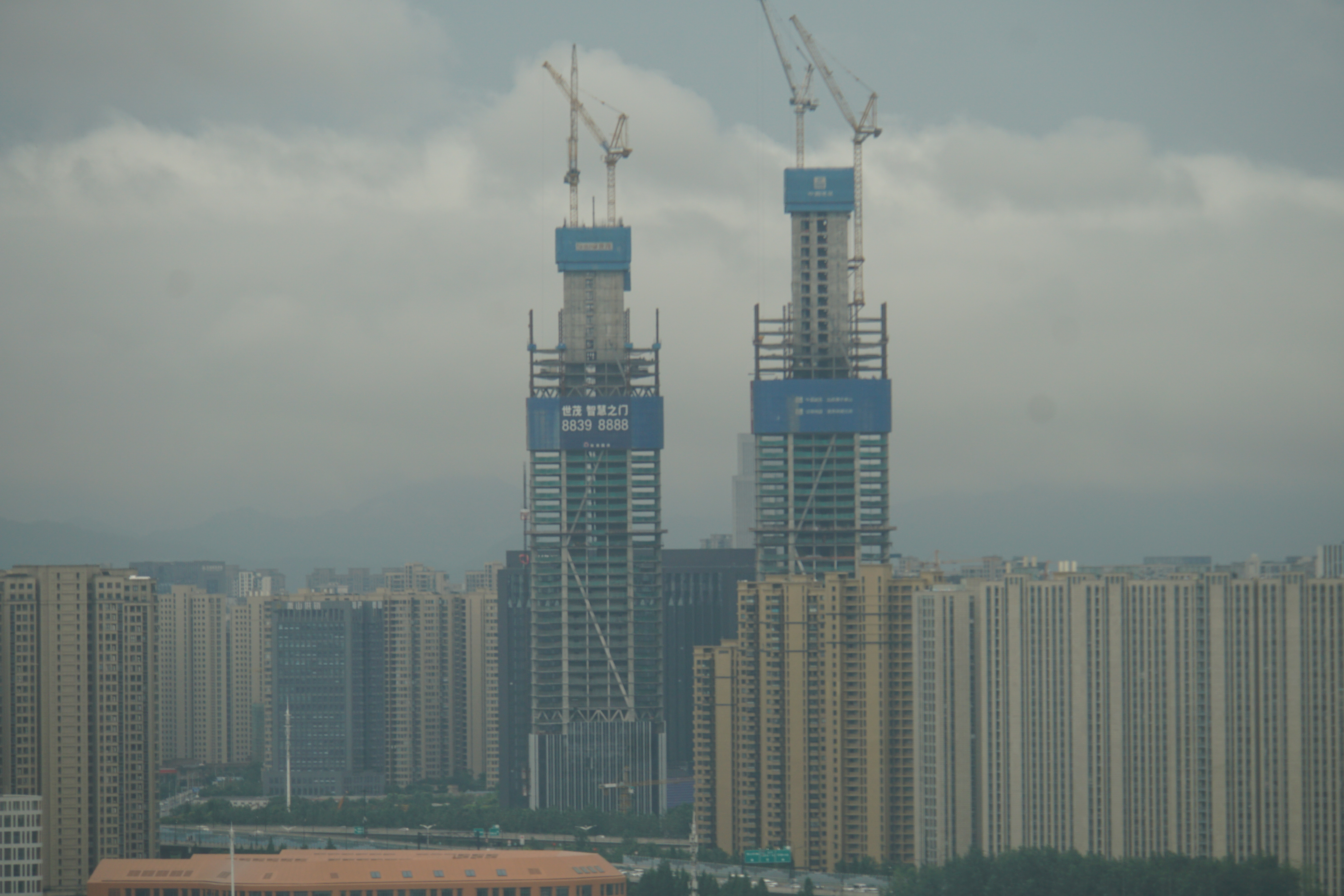 20200707建设中的世茂智慧之门